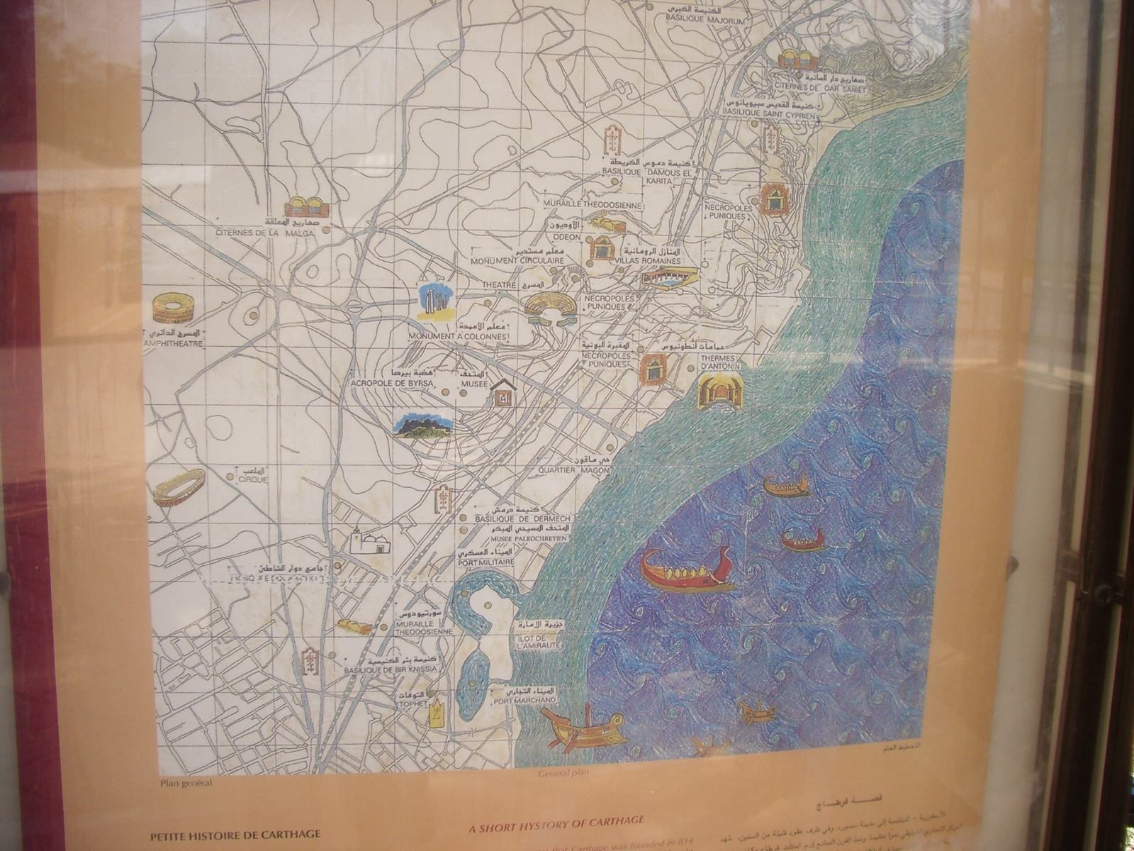 Llocs de la zona de Cartago